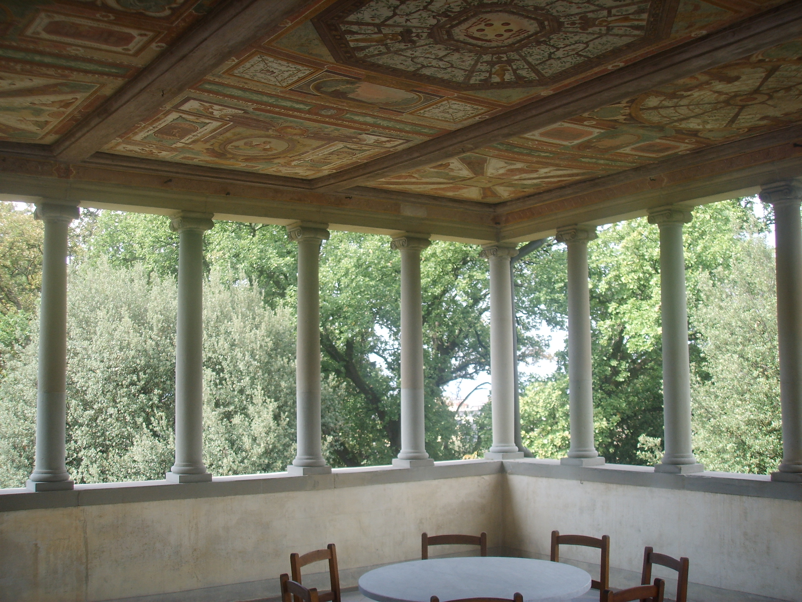 Villa Medicea di Careggi, inside in Florence, Italy